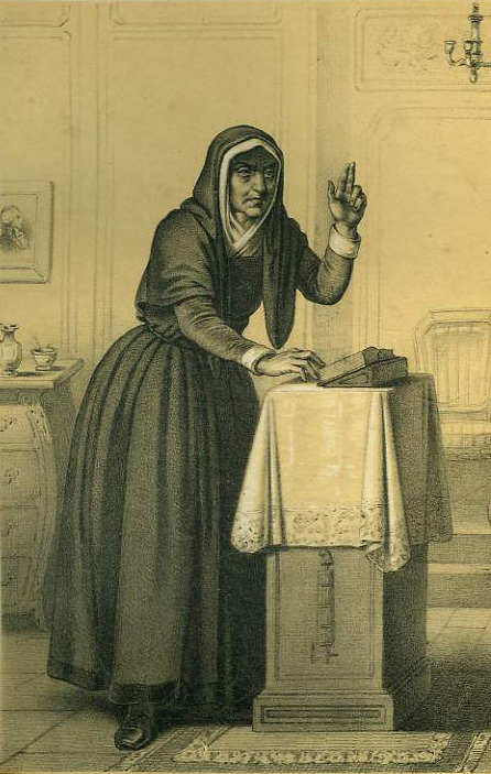 Lithographie représentant Catherine Théot. Vue d'artiste d'Alexandre Lacauchie, Paris, P. Amic l'aîné, imprimerie Jules Rigo et Cie, 1835.